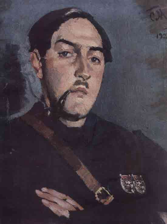 Малютин С. “Портрет Ю.Саблина”, 1923